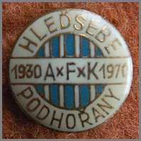 AFK Hleďsebe logo